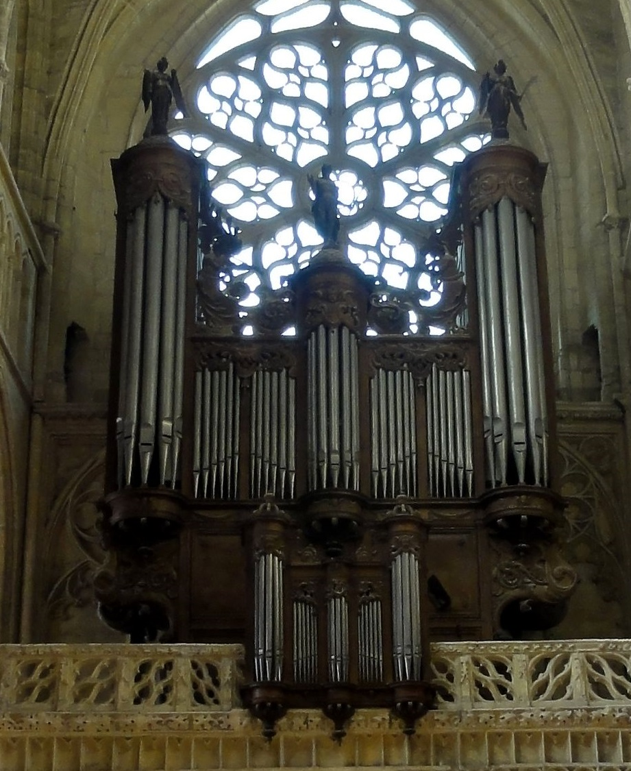 Meaux - Grand orgue de la cathédrale par le facteur Valéran de Héman